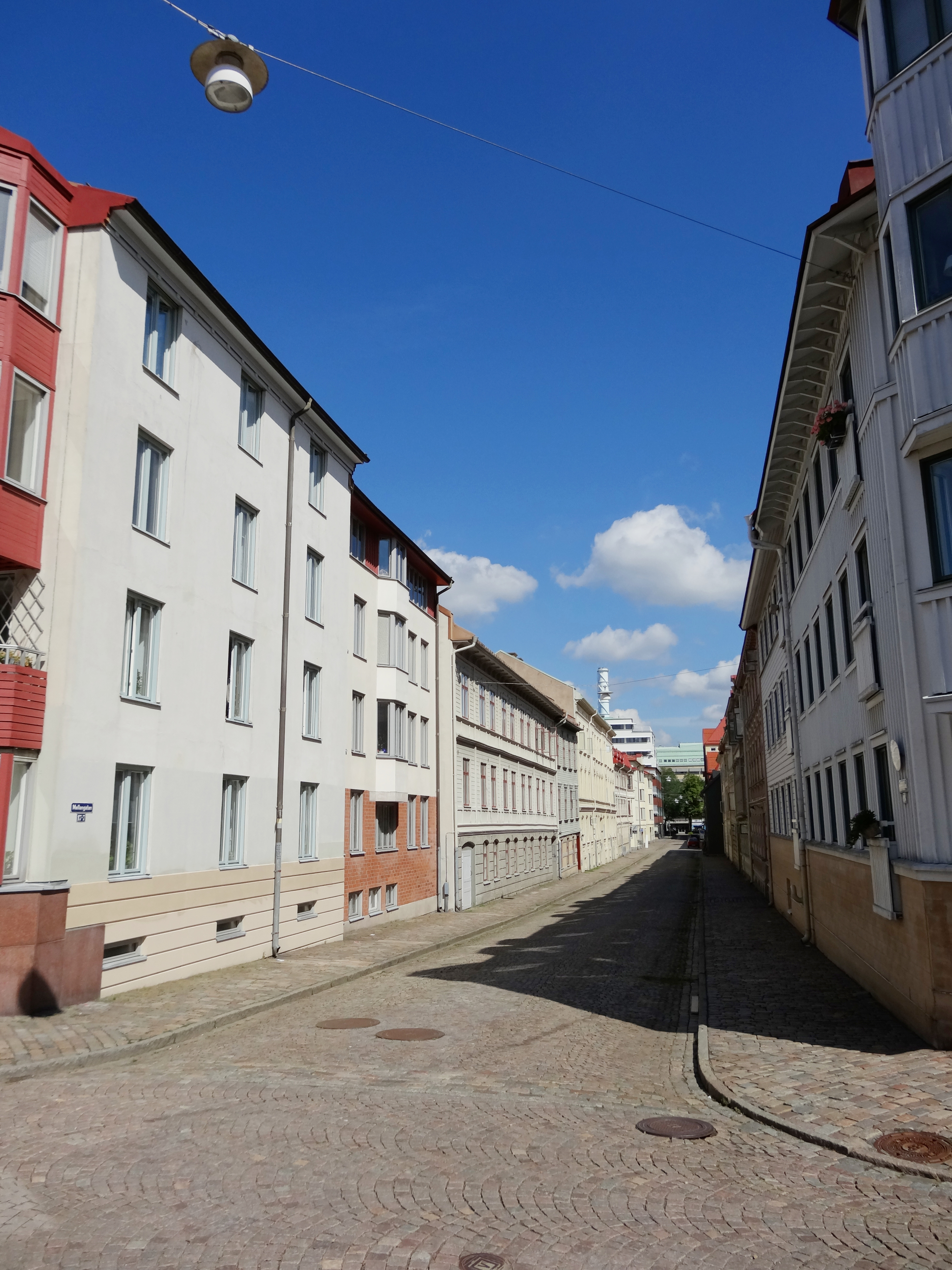 Mellangatan i stadsdelen Haga i Göteborg.